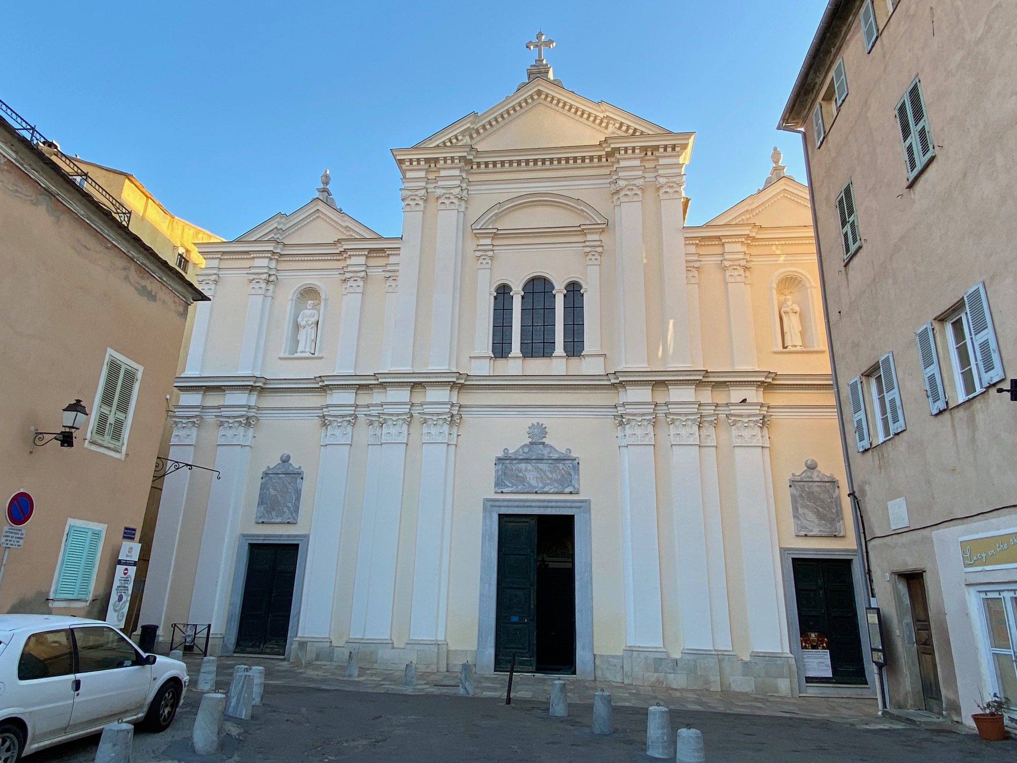 Facciata principale di a catedrale Santa Maria Assunta, in citatella di Bastia